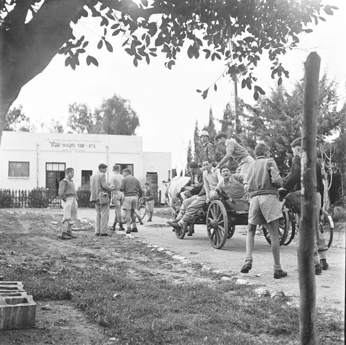 אוסף צילומים של הצלם זולטן קלוגר טווח מספרי התשלילים 31714 - 31765: בית הספר המקצועי "עמל" בחדרה